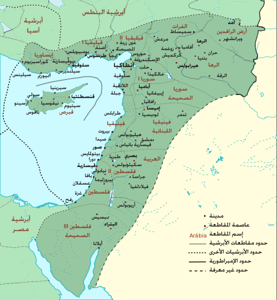 خريطة للأبرشية المشرقية في بلاد الشام التابعة للإمبراطورية البيزنطية في عام 400 م، يظهر فيها المقاطعات ومراكزها وأهم مدنها.